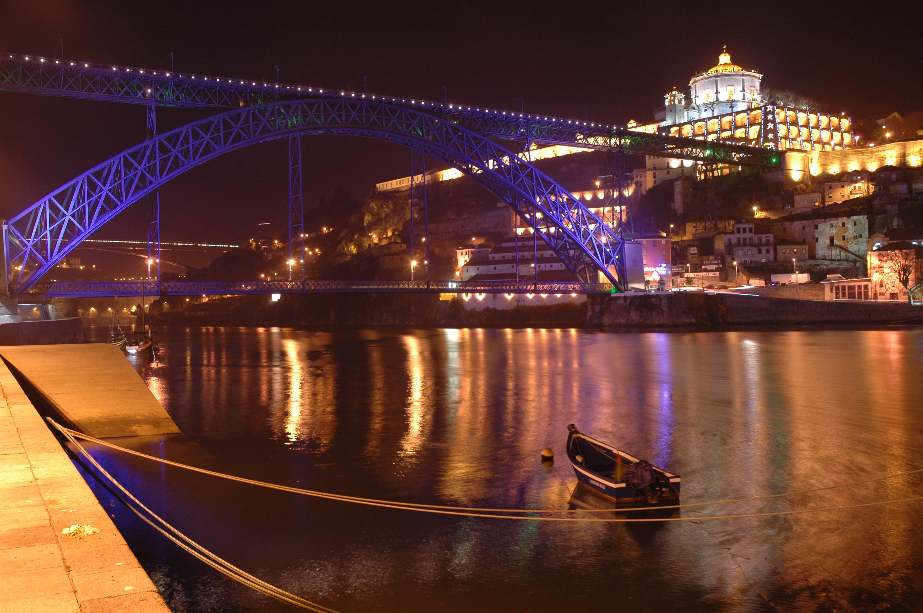 Porto - Pont de Lluís I